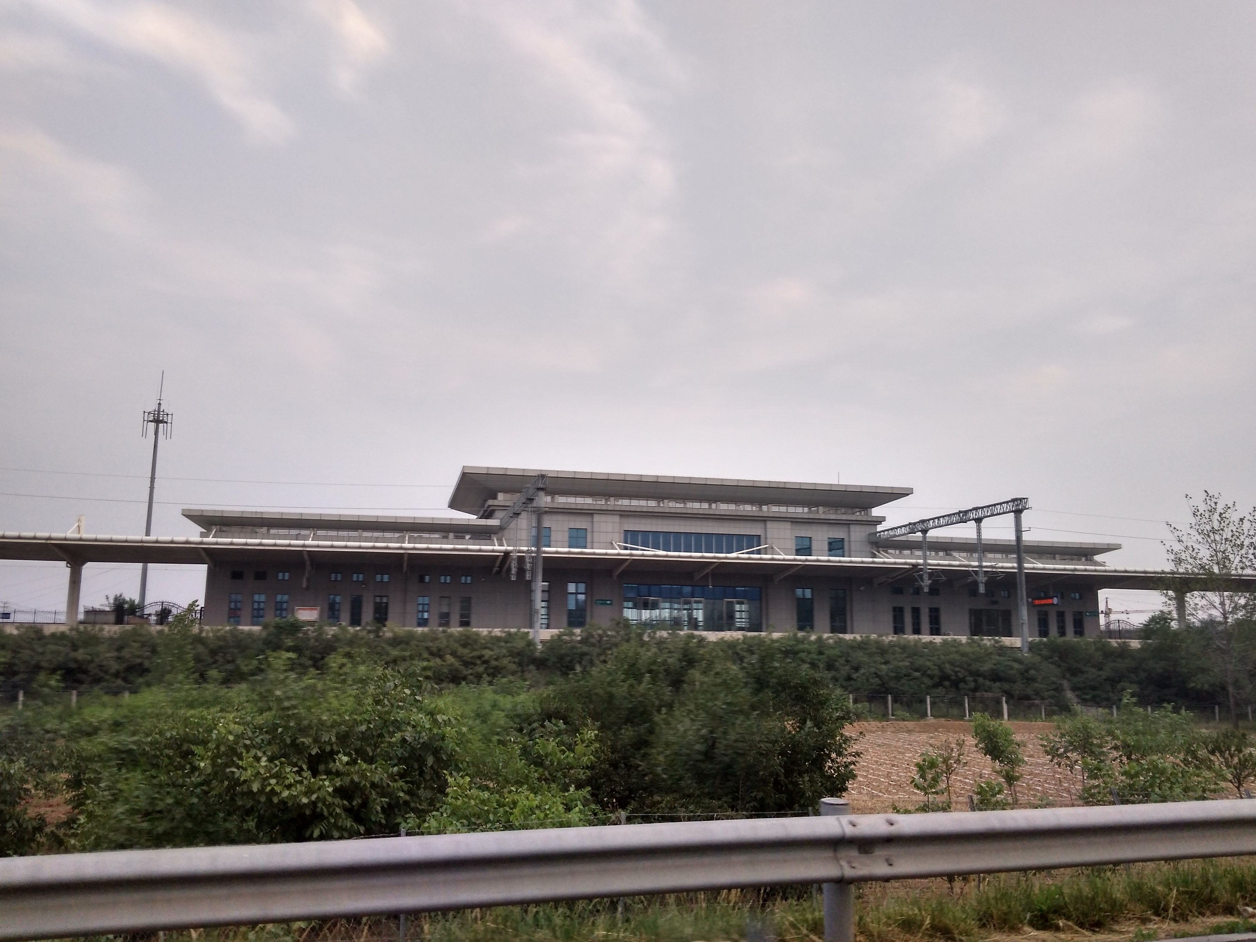 中文（中国大陆）: 兰陵北站站房及月台